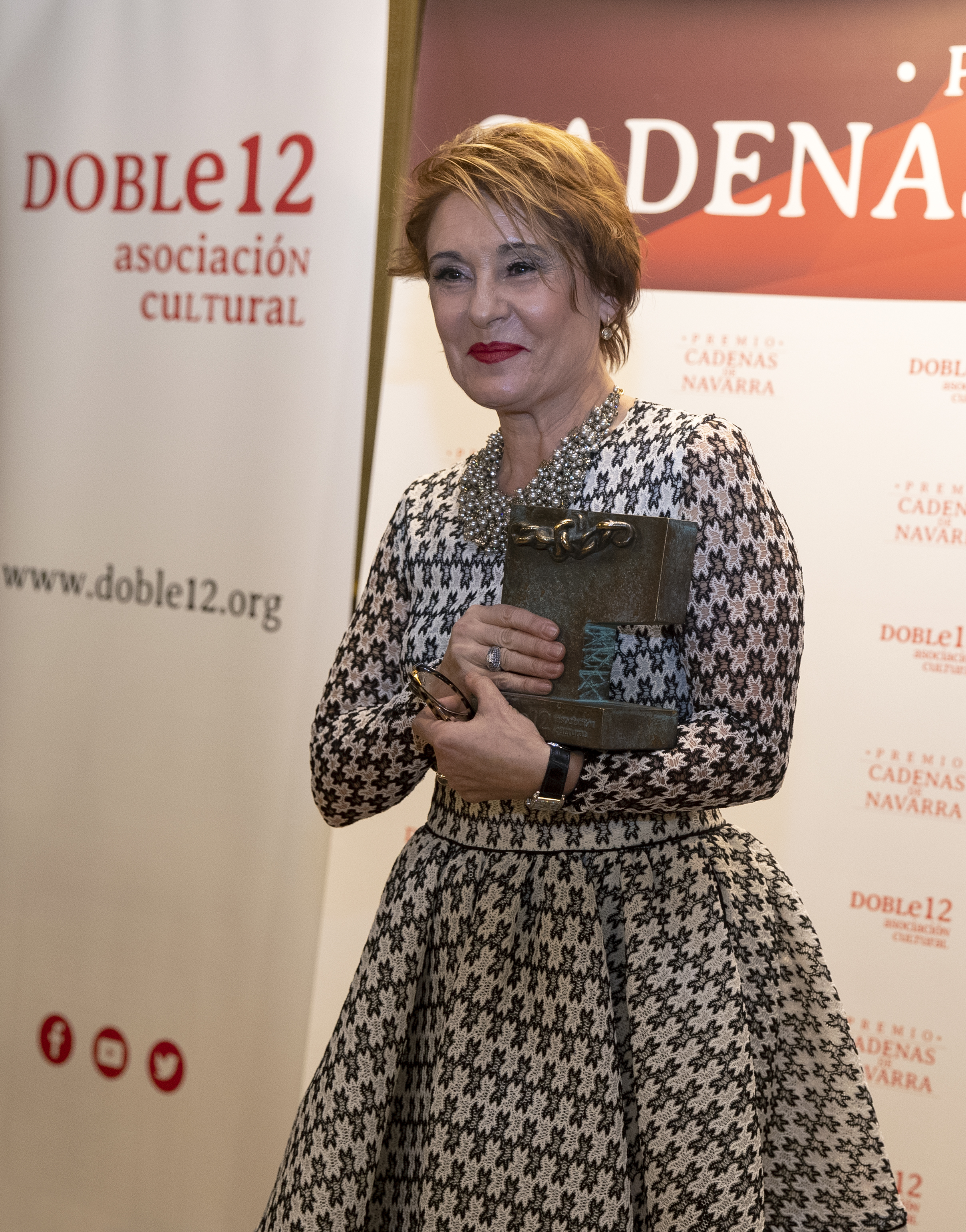 María Bayo con el Premio Cadenas de Navarra 2018